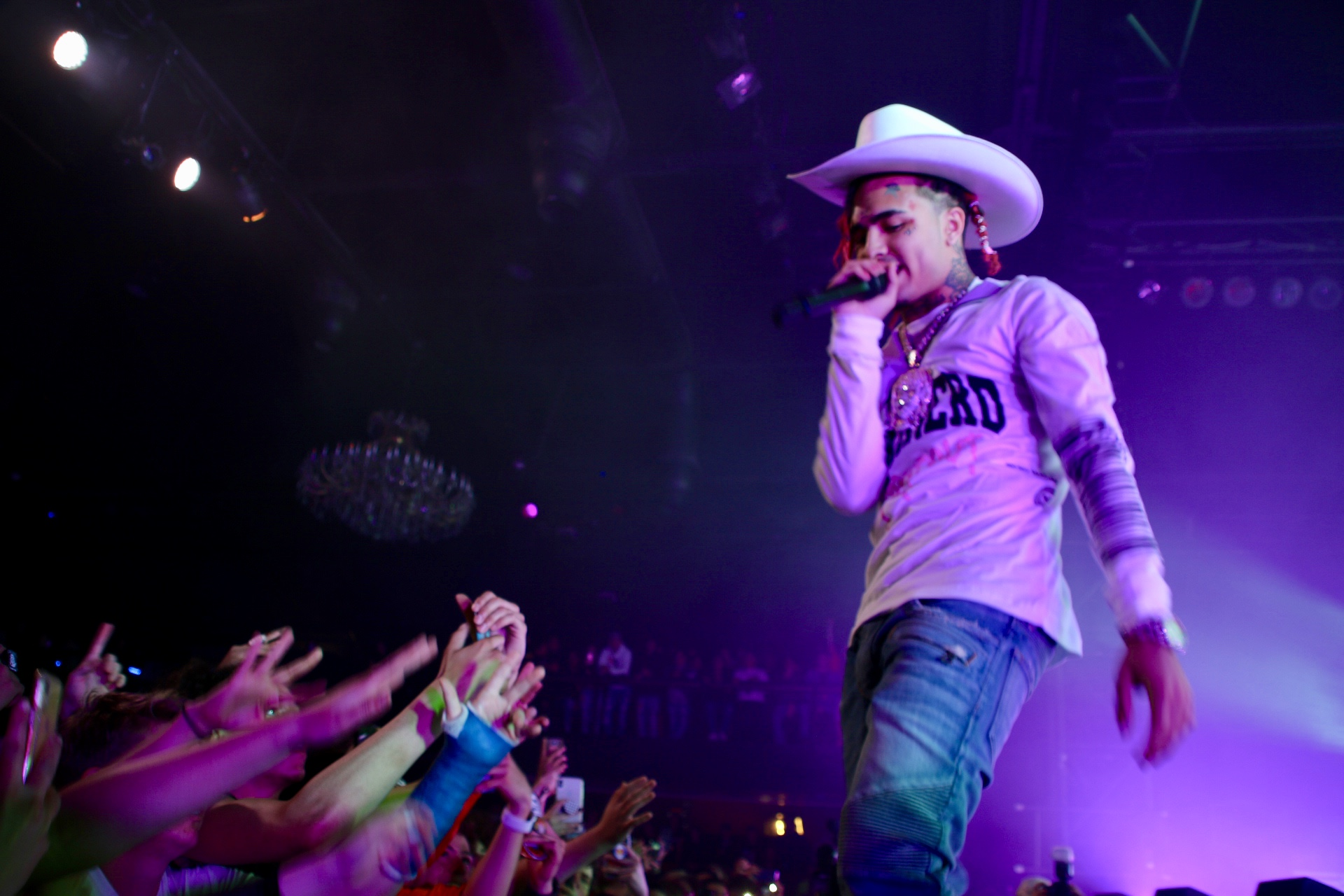 Lil Pump ::: Fillmore Auditorium ::: 05.01.19